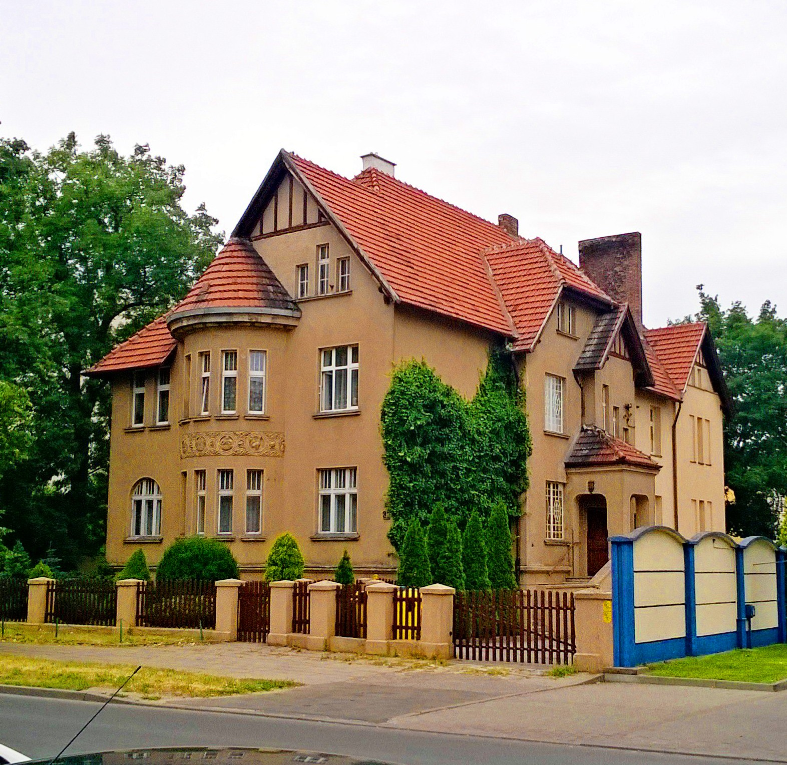 Budynek przy ul. Grudziądzkiej 37 w Toruniu